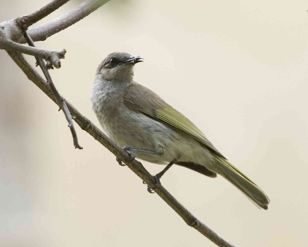 Indonesian Honeyeater Lichmera limbata Lombok, Indonesia July 8, 2007 _Q0S7143